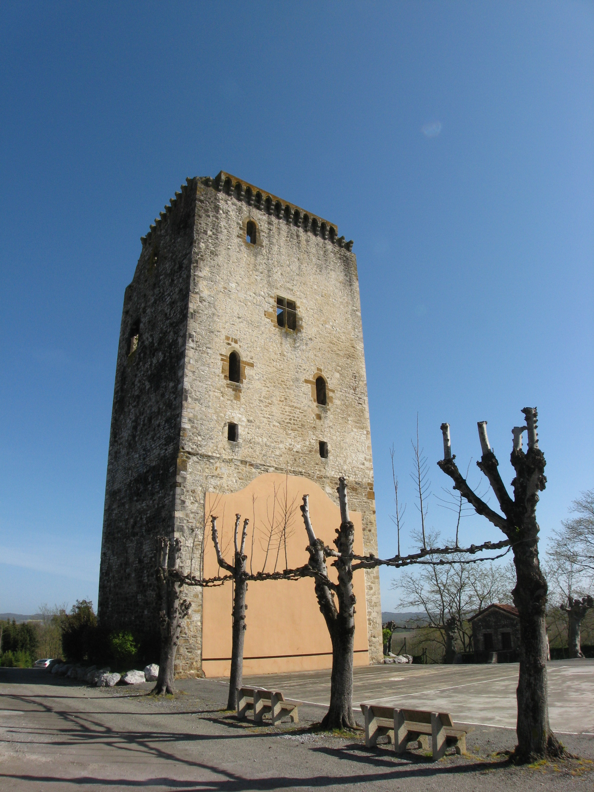 Tour carrée à Labastide-Villefranche (Pyrénées-Atlantiques) (Pyrénées).